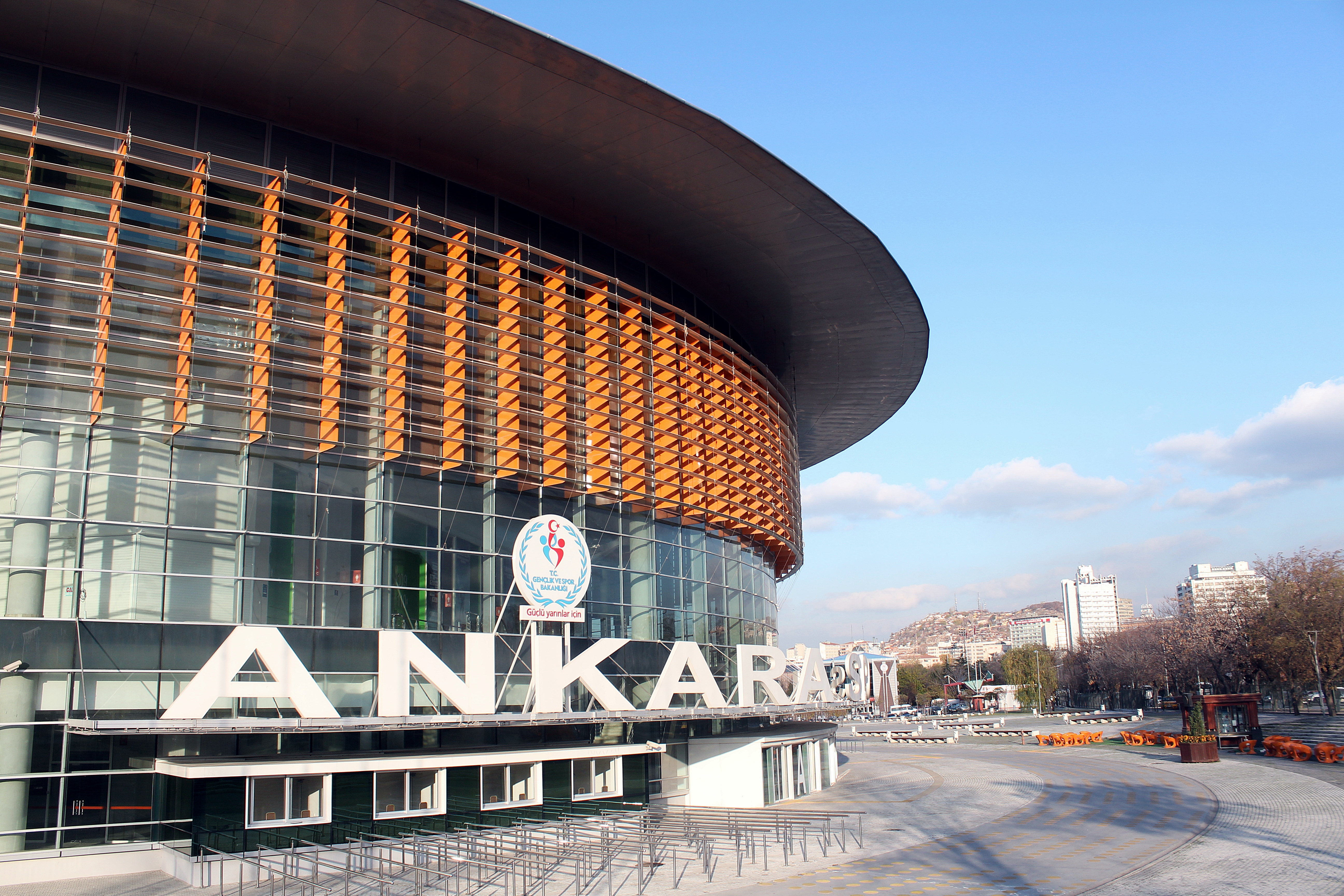 Ankara Arena